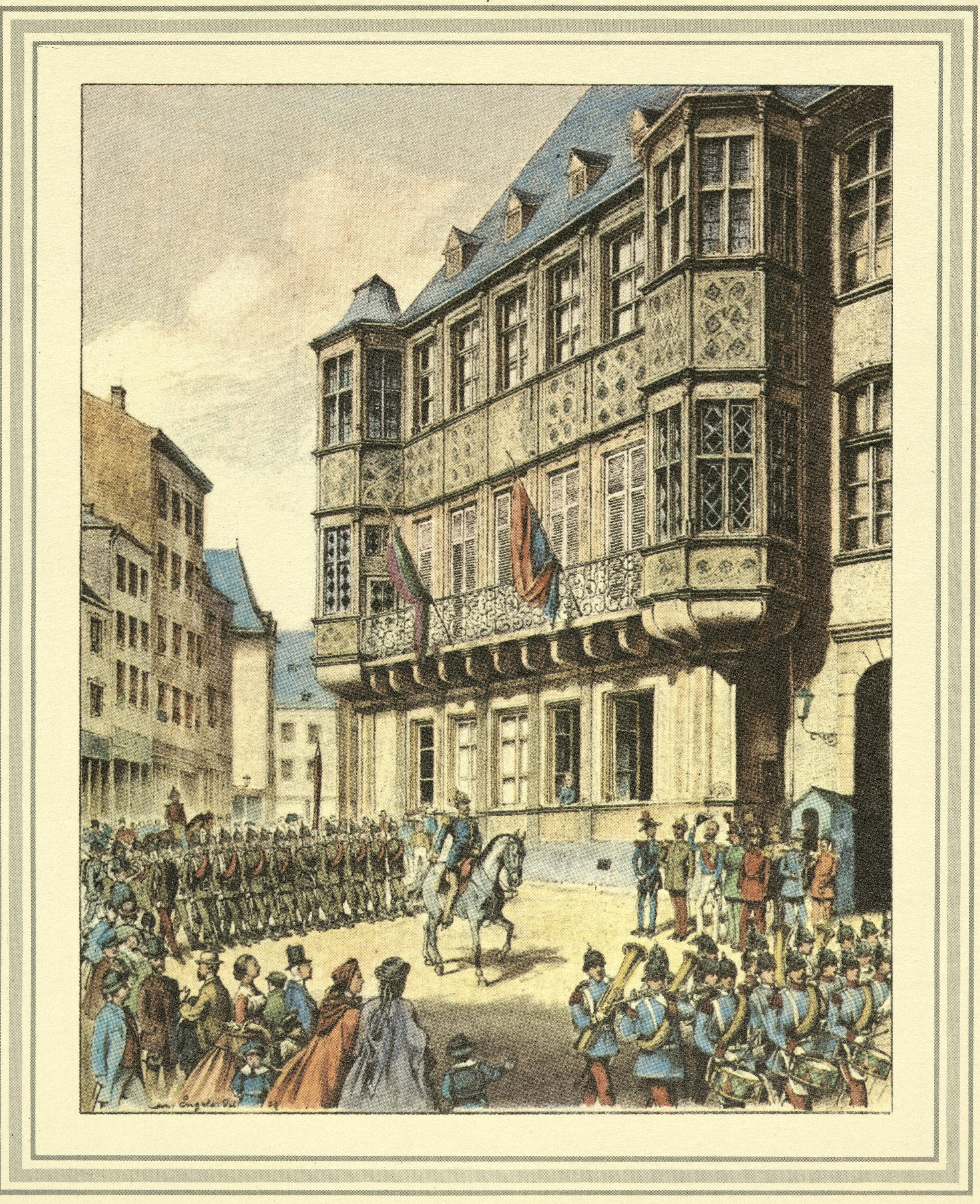 Dessin pittoresque de la forteresse de la Confédération germanique (Bundesfestung) Luxembourg par Michel Engels (1851-1901): XXIV - Départ de la garnison prussienne